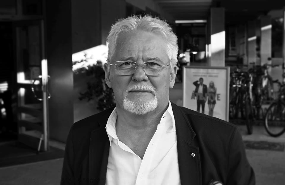 Rofusz Ferenc (Budapest, 1946. augusztus 19.) Kossuth-díjas magyar rajzfilmrendező. A nevéhez fűződik az első magyarországi Oscar-díj, melyet az általa rendezett háromperces A légy című film 1981-ben kapott a legjobb animációs rövidfilm kategóriában.